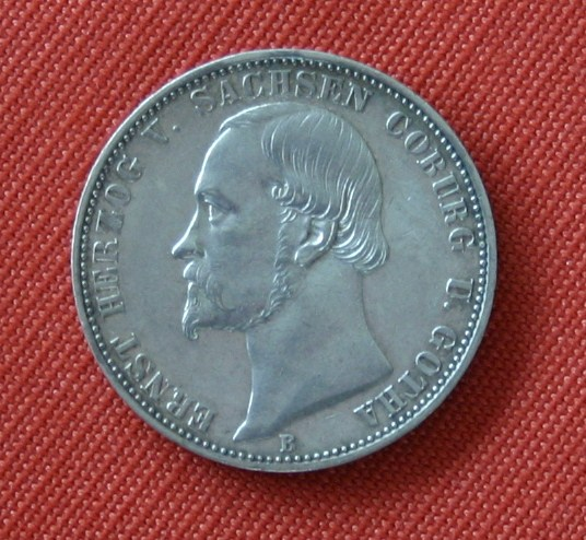 Vereinstaler mit Ernst II Sachsen Coburg Gotha aus 1869